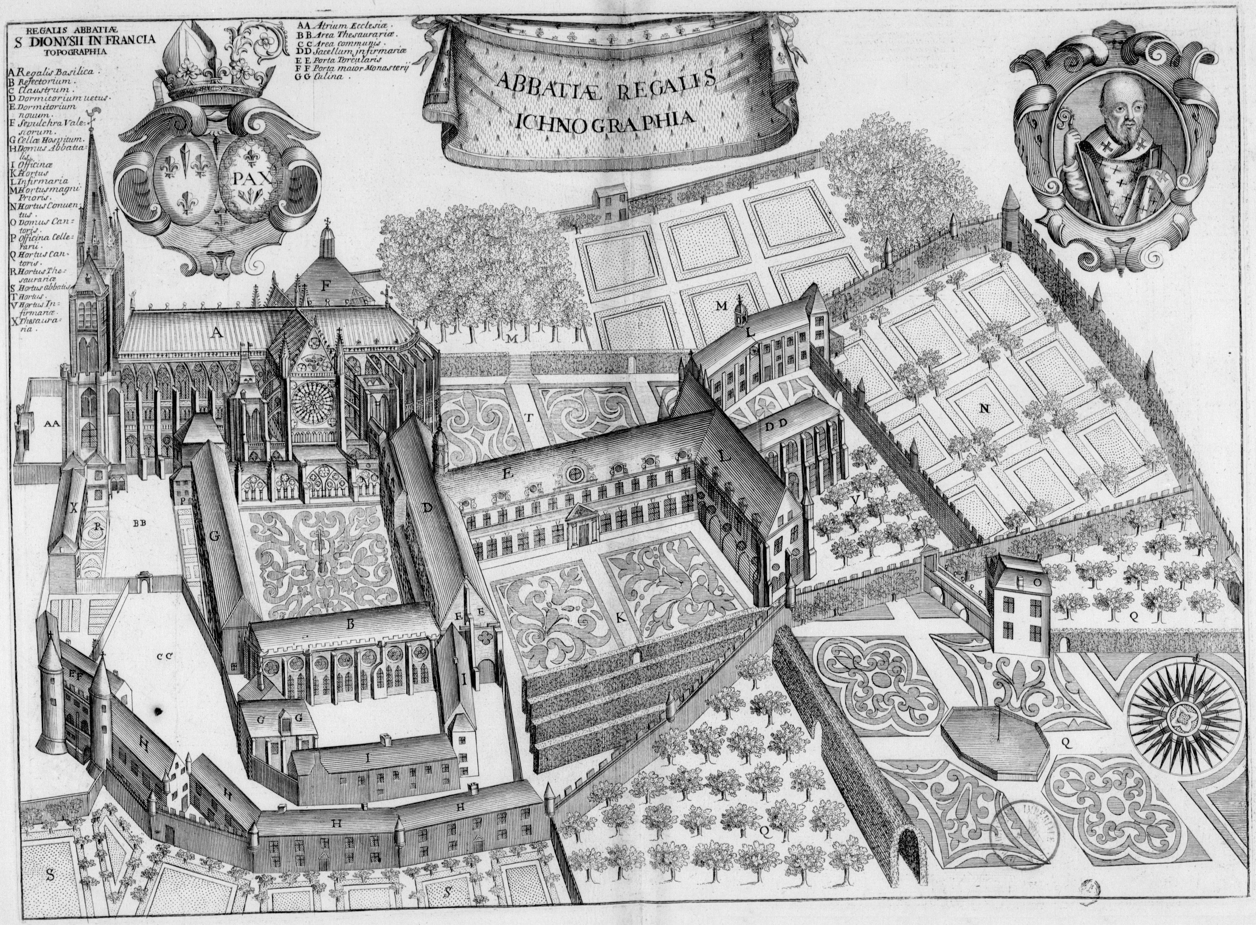 Planche gravée du 17ème siècle représentant l'abbaye de Saint-Denis en France, dans le livre Monasticon Gallicanum.